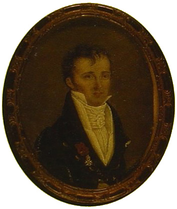 Marc-Antoine Jullien de Paris. Miniature (1803 ou après 1803). Don Blanche Foley au Musée national de l'éducation.